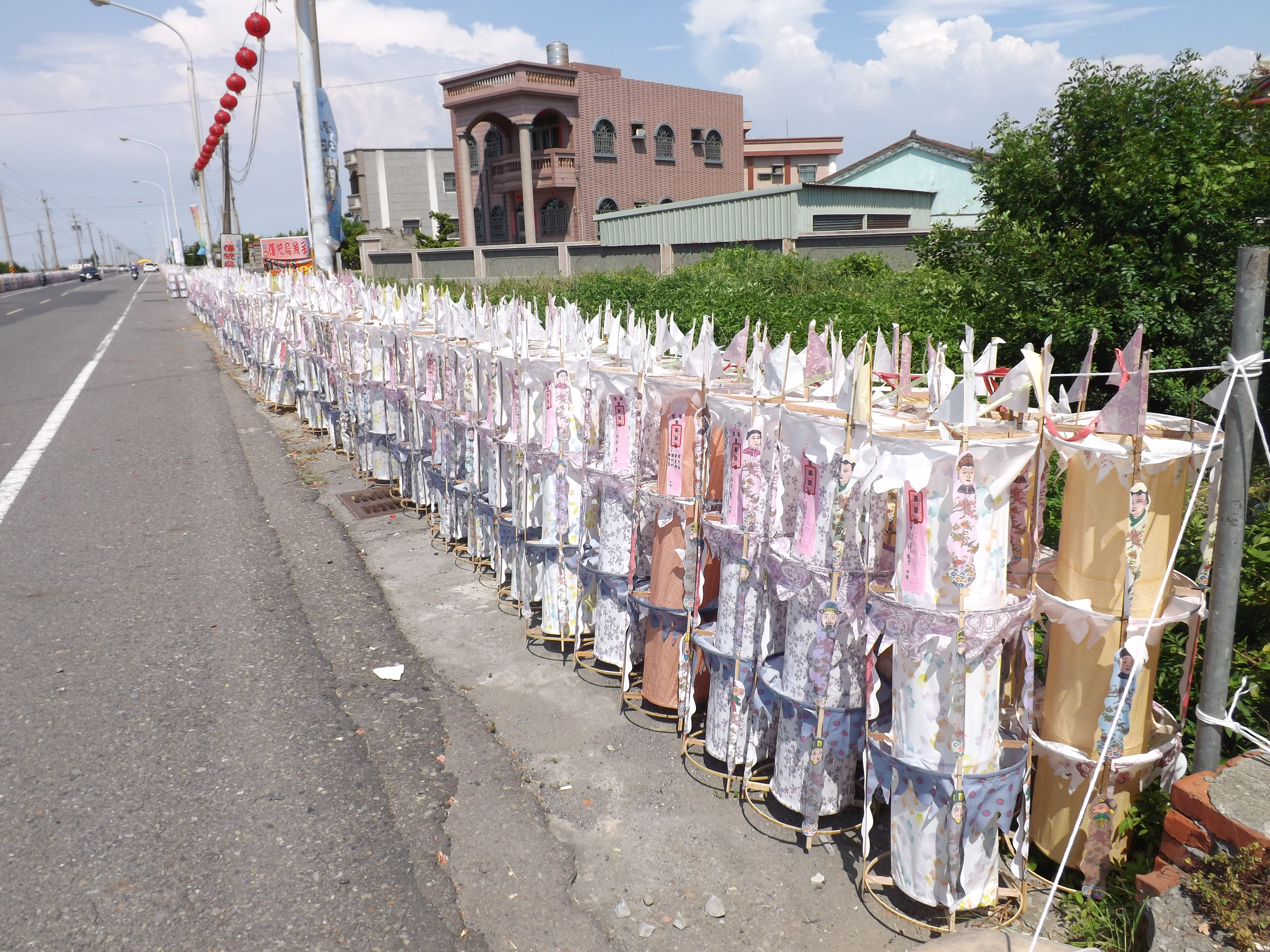 水藏